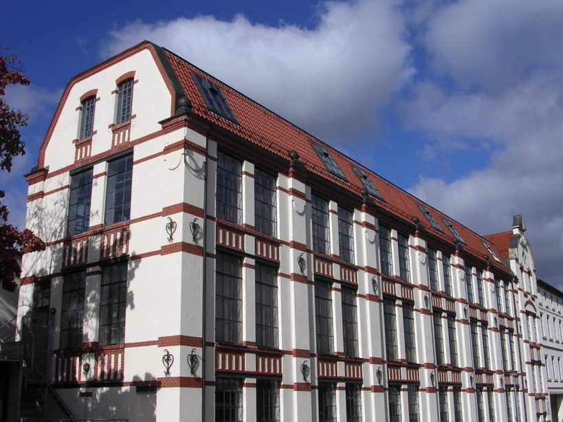 Technisches Museum der Bandweberei in Großröhrsdorf (Sachsen)